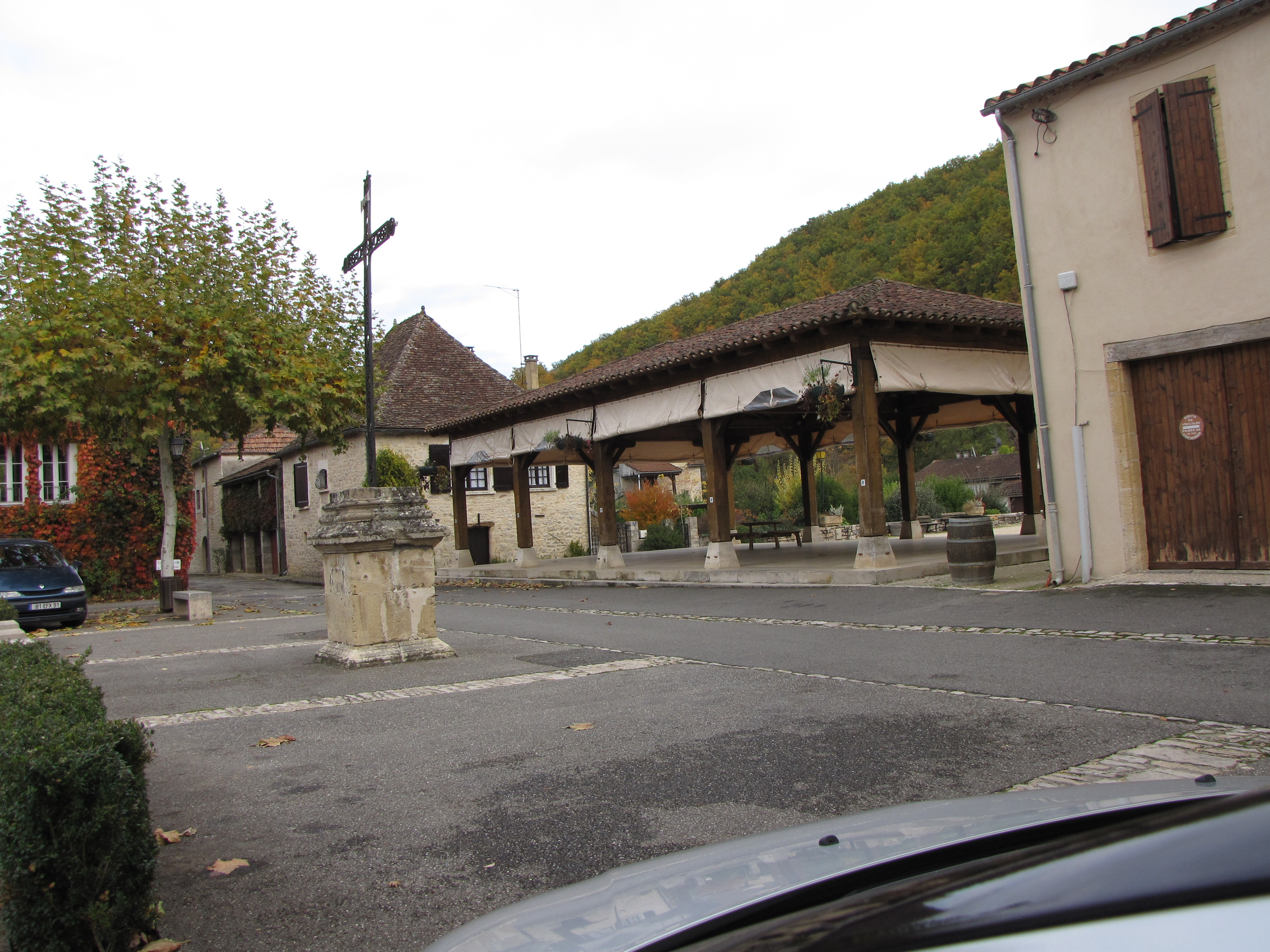 Halle de Castelfranc